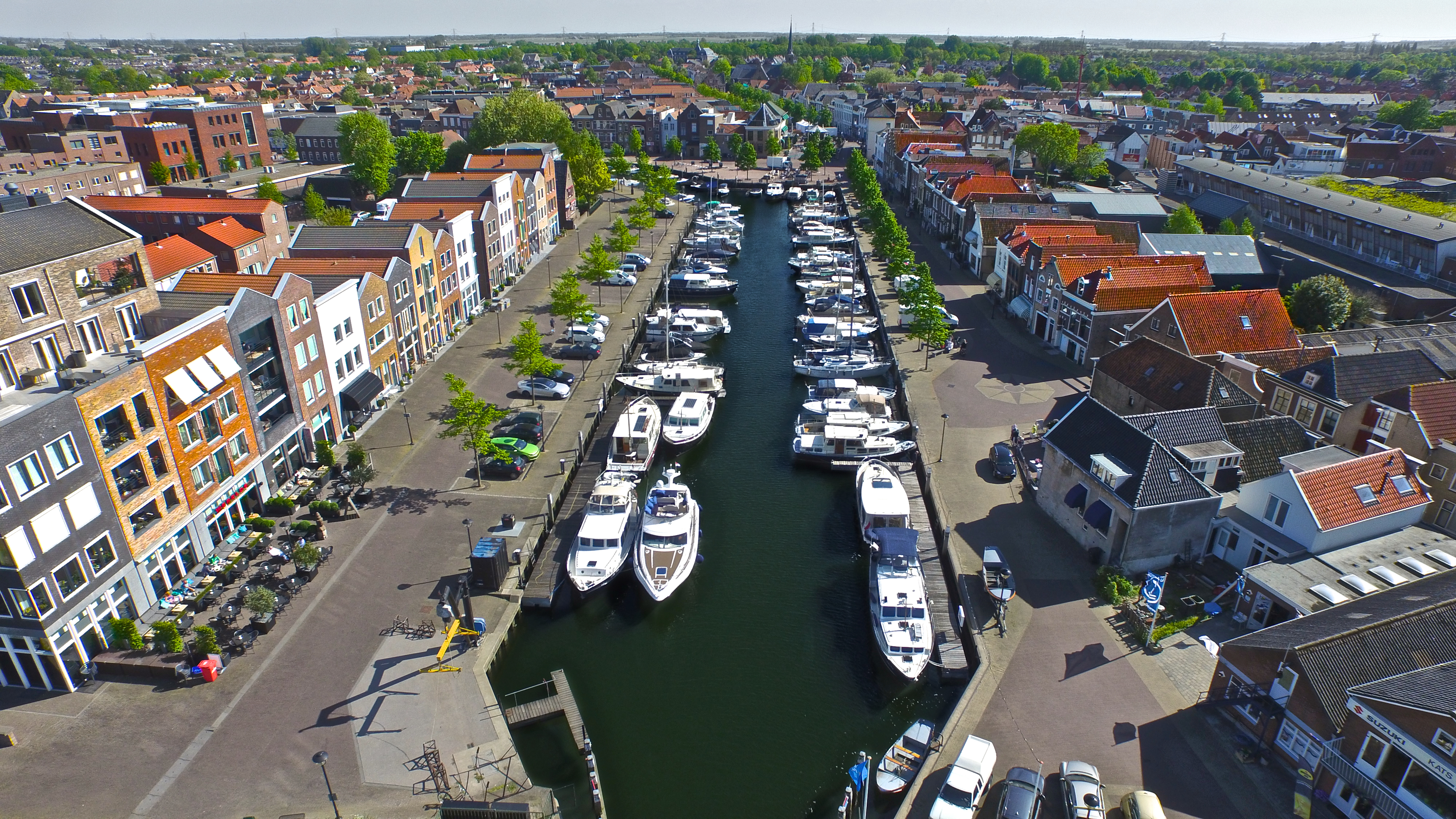 De haven van Oud-Beijerland